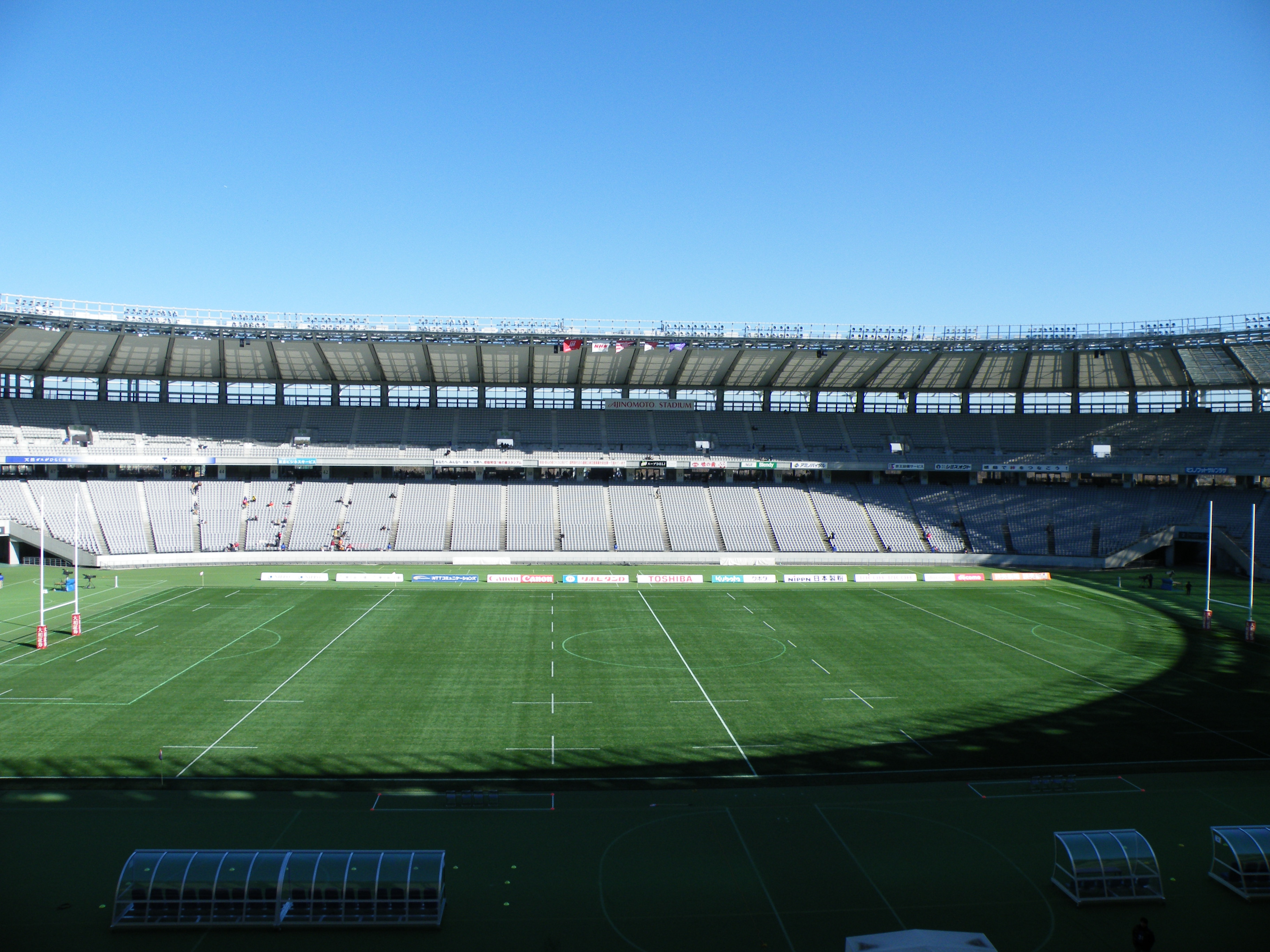 第51回全国大学ラグビーフットボール選手権大会、試合前の様子。